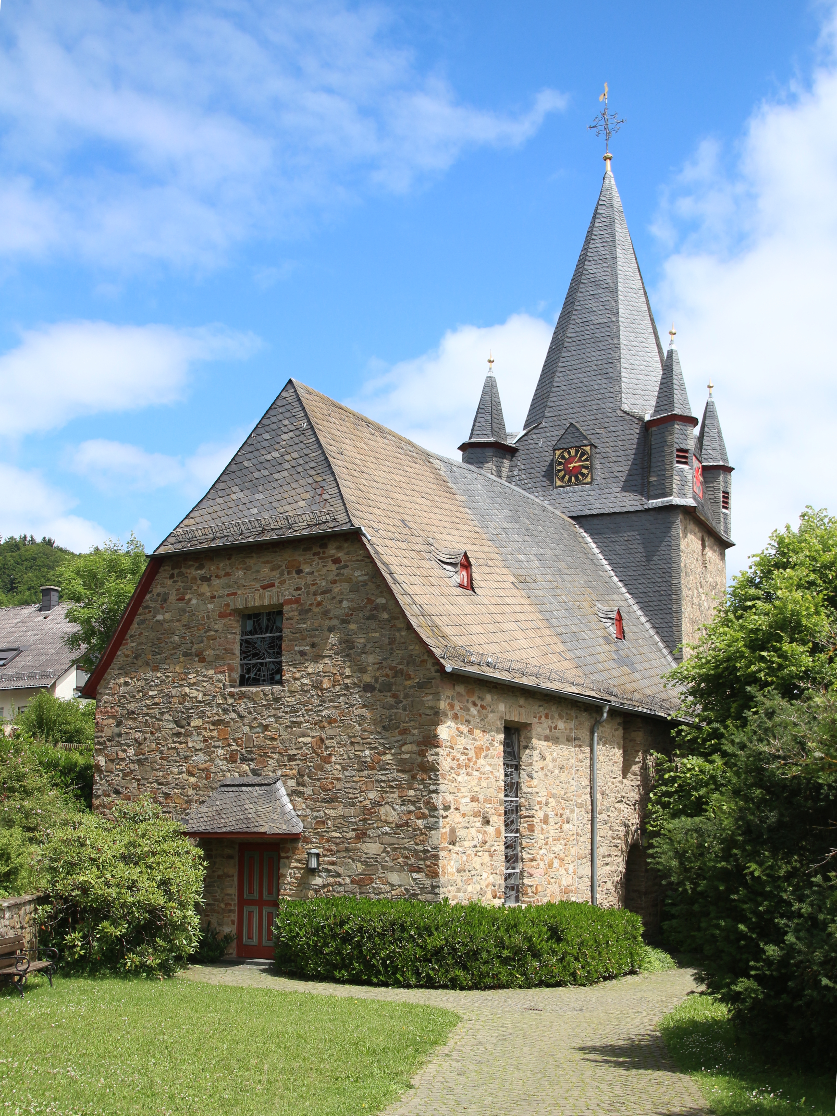 Evangelische Kirche Lixfeld, Landkreis Marburg-Biedenkopf, Hessen